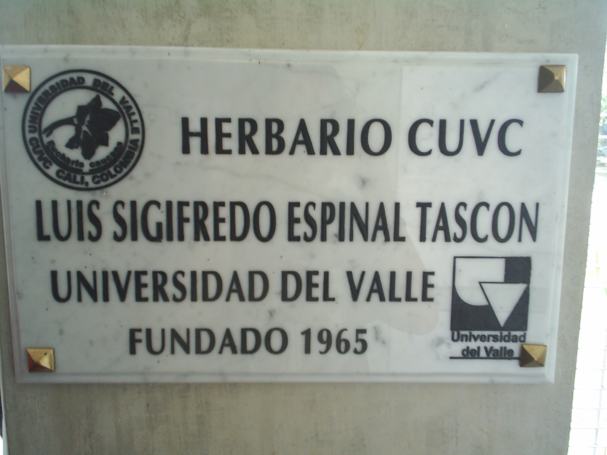 Herbario Luis Sigifredo Espinal TascónEsperanto: Sekplantaro Luis Siĥifredo Espinal TaskonBikol Central: Luis Sigifredo Espinal Tascón Hermarium